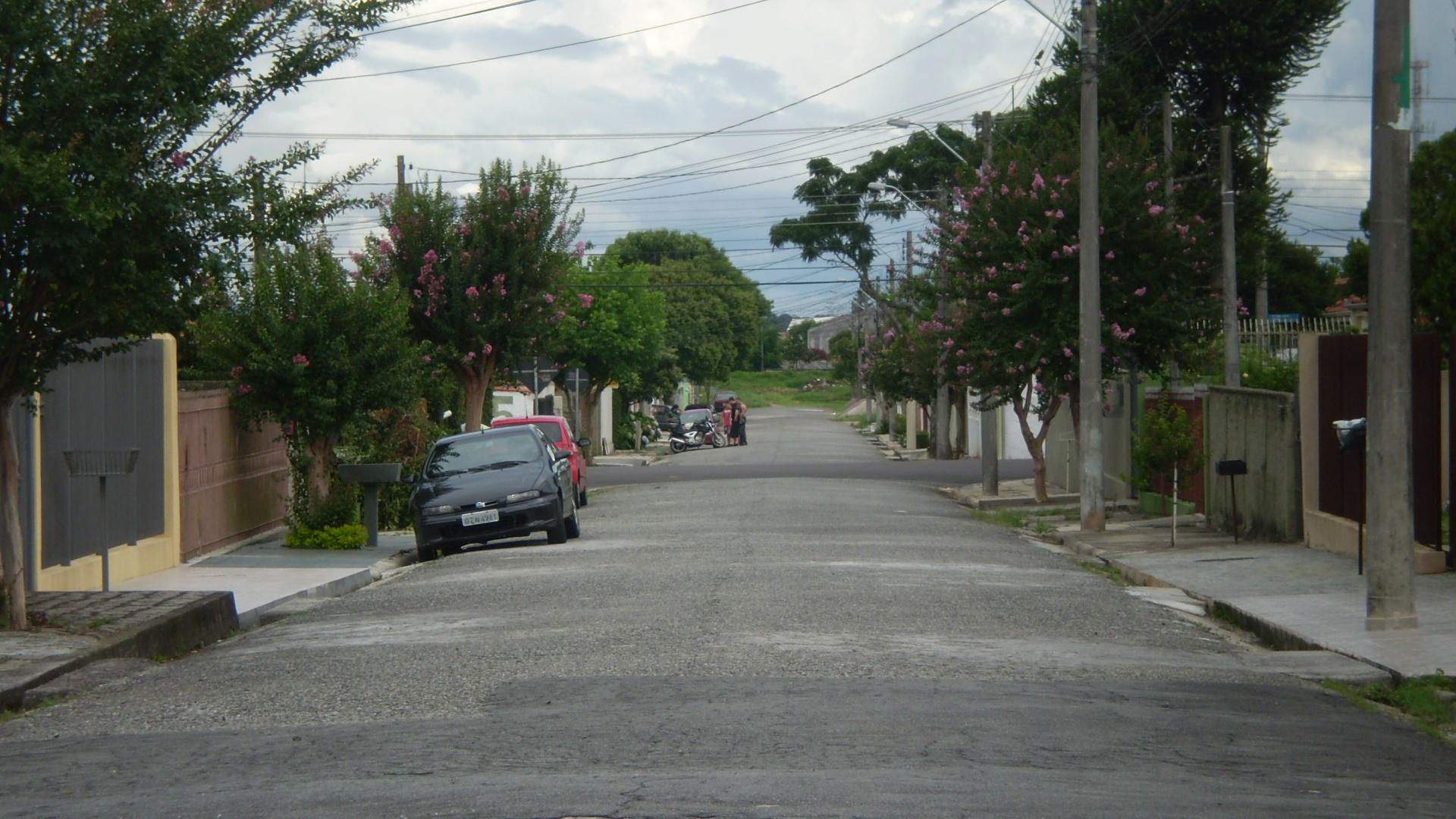 Rua Reverendo Lauro de Castro - Cajuru